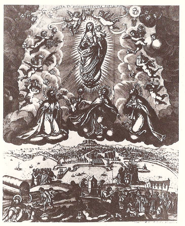 Vergine Immacolata con santi sulla città di Napoli - Incisione